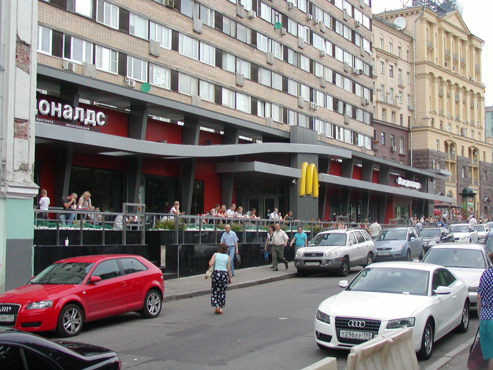 Первый в СССР и России Макдоналс (после реконструкции) в Москве, на Большой Бронной улице.